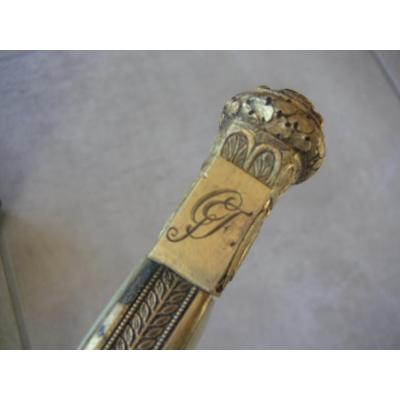 Monogramme figurant sur l'épée du général Grouvel sous l'Empire (1813)